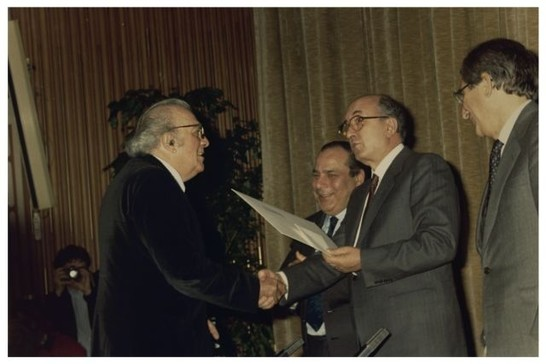 Il presidente del consiglio Ciriaco De Mita assegna i Premio speciale della cultura - Auletta dei gruppi